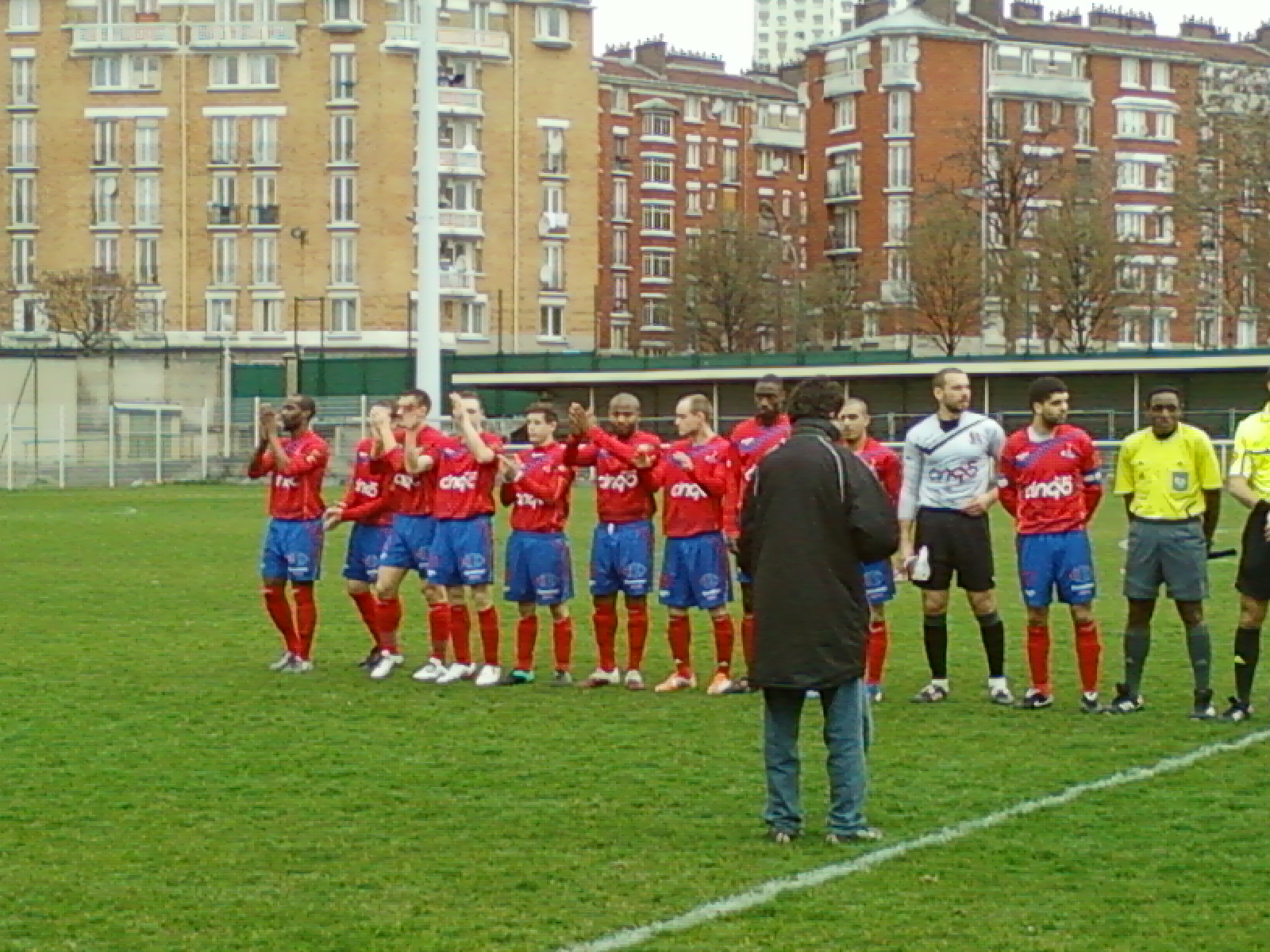 Equipe du FC Chartres lors du match Paris FC B-Chartres du 13 mars 2011